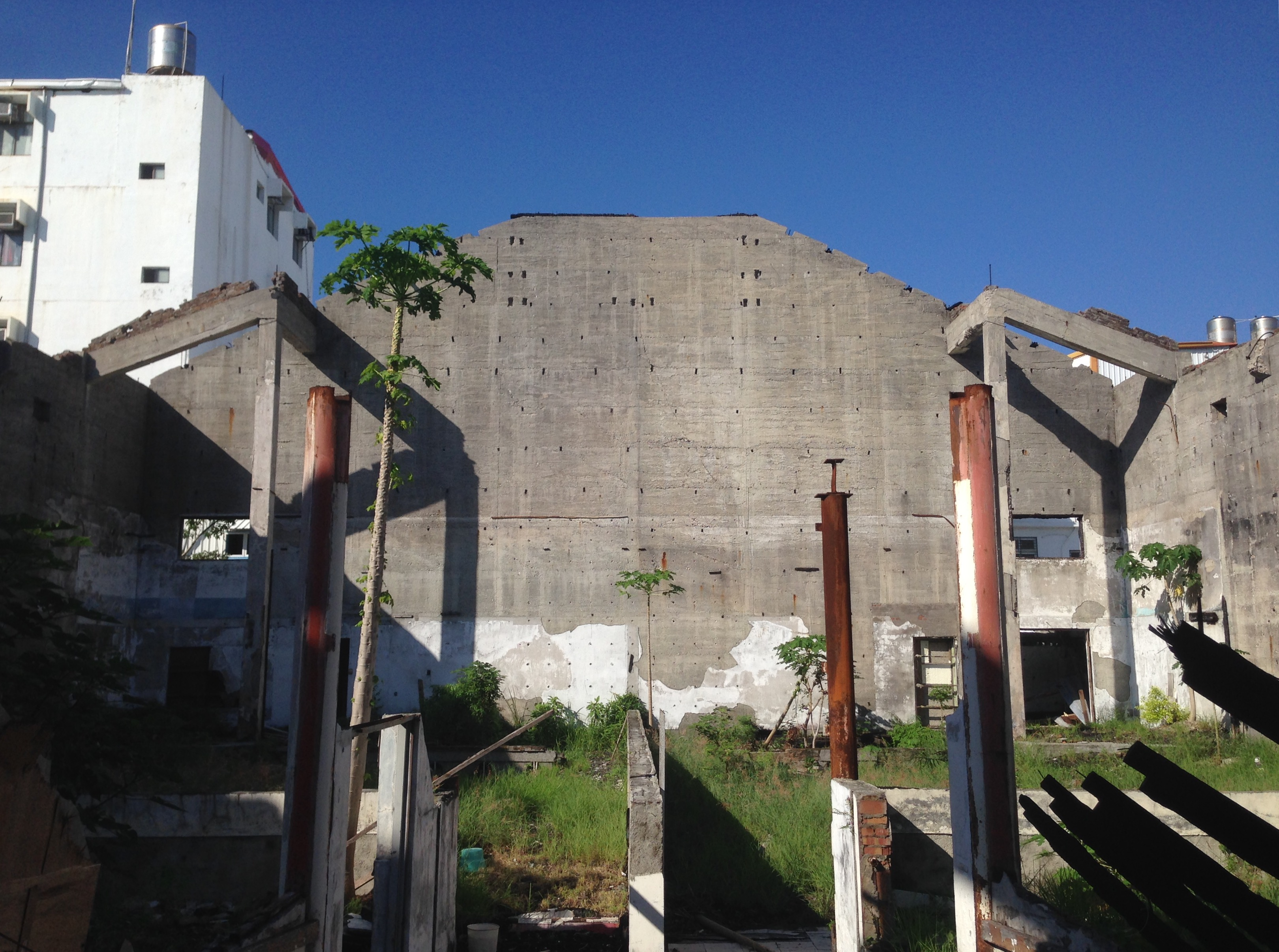 中文（台灣）: 台東大同戲院殘骸